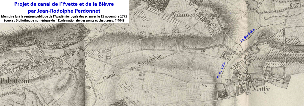 Canal projeté en 1776 tronçon de Palaiseau à Massy